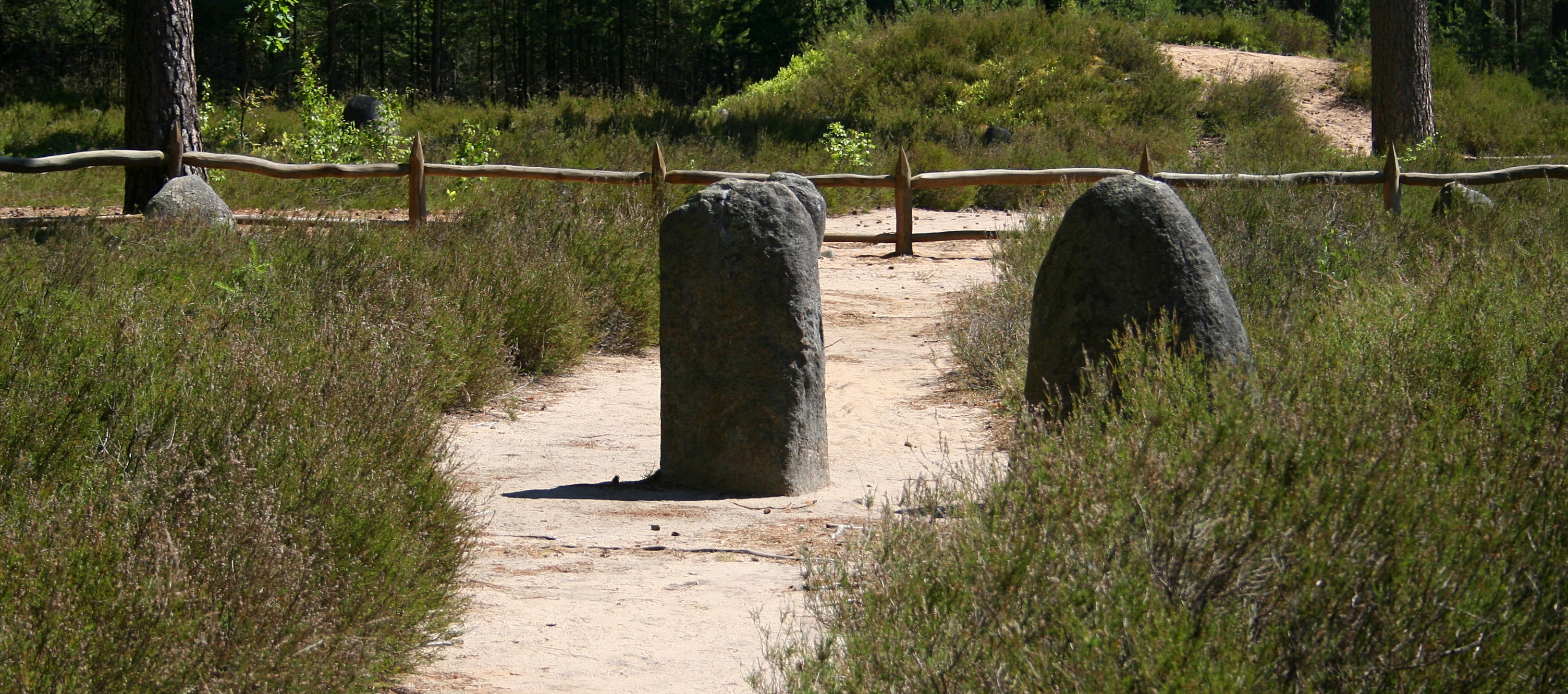 Stelle w kręgu X na cmentarzysku Gotów w Odrach, gmina Czersk